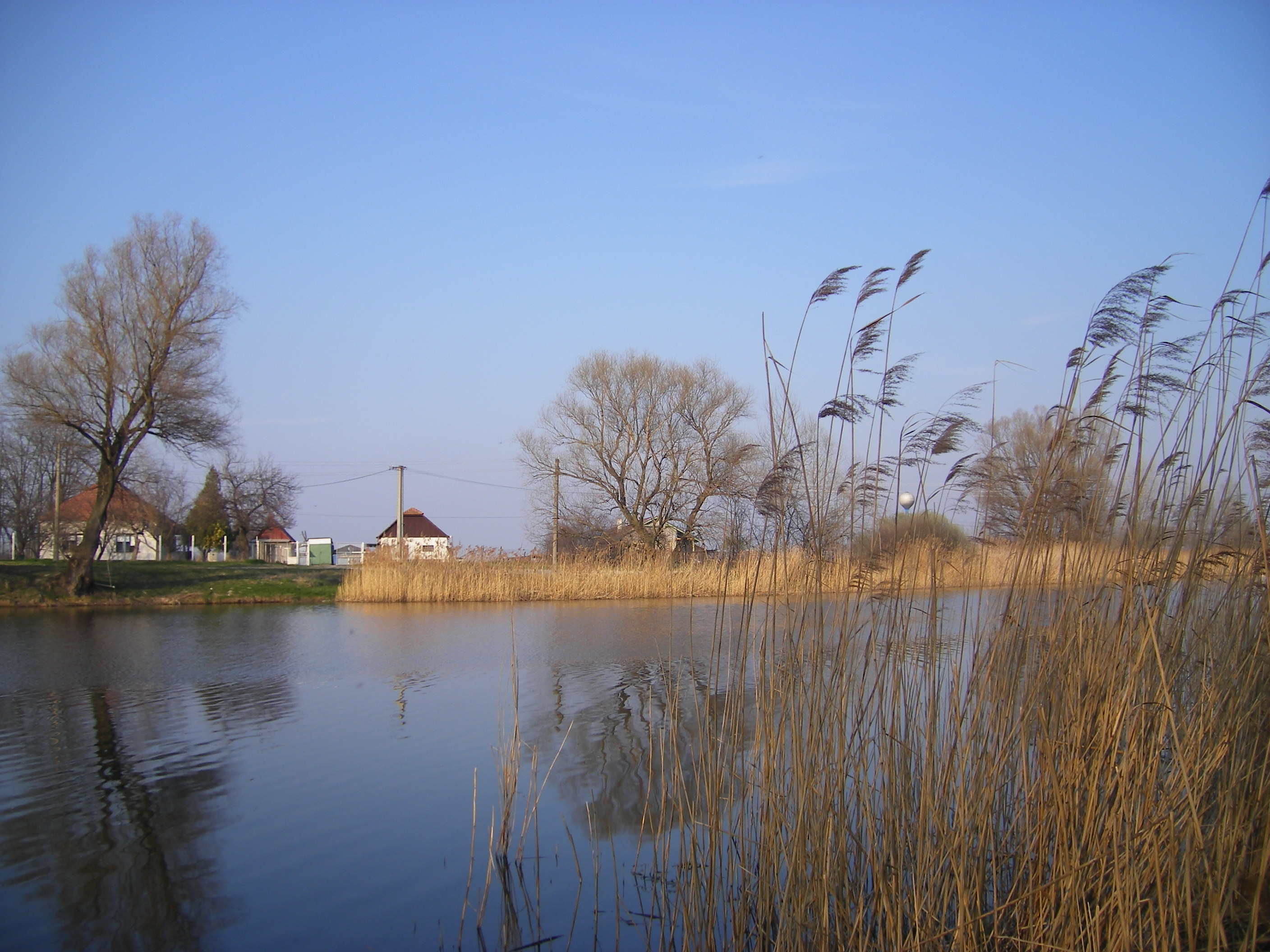 Zsemlékes, a Zsemlékesi-csatorna partján.